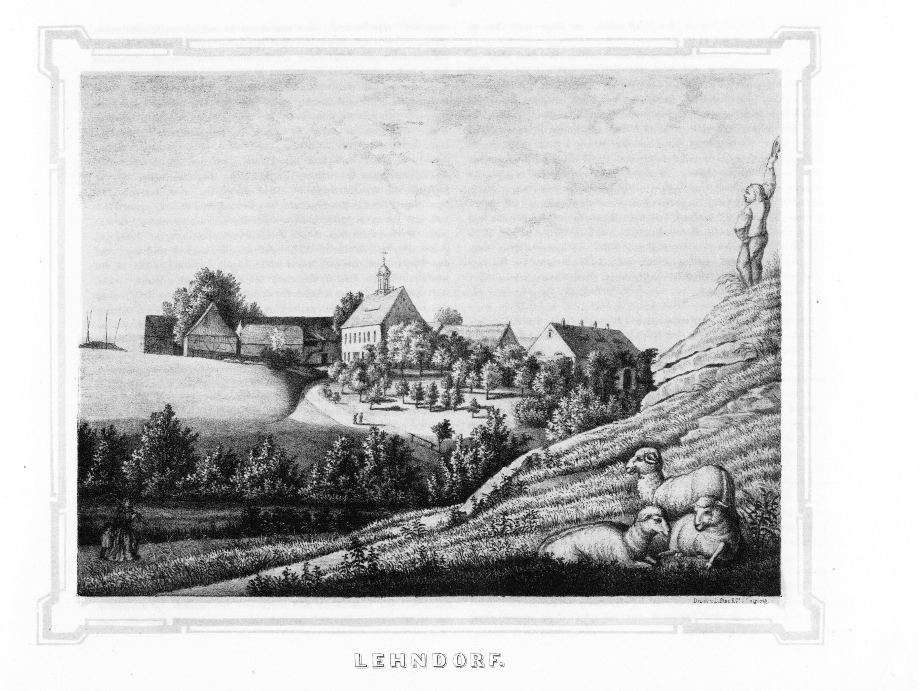 Lehndorf aus: Album der Rittergüter und Schlösser im Königreiche Sachsen Markgrafenthum Oberlausitz Section: III